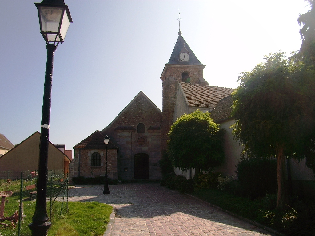 Eglise Saint-Julien de Villejust (91)